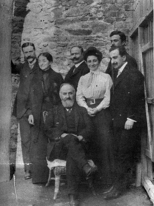 От ляво надясно: Халилаос Занас, Елени Зана, Димитриос Какавос, Ифигения Зана-Малто, Константинос Занас и зад него Алкивиад Малтос. В центъра Димитриос Занас.